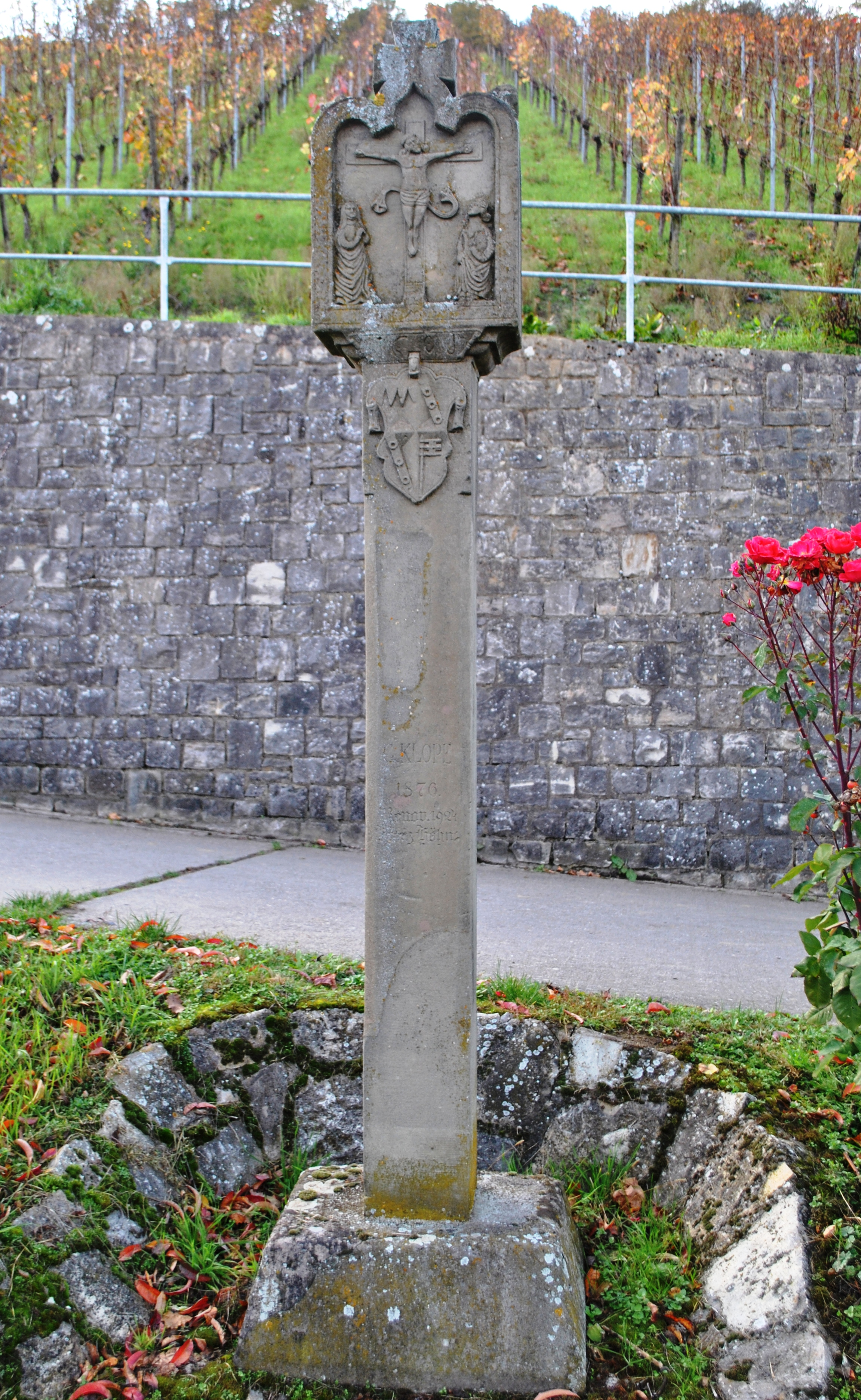 Bildstock Mit Kreuzigung, bezeichnet „1605“ und „1876“, erneuert 1924 D-6-75-174-272